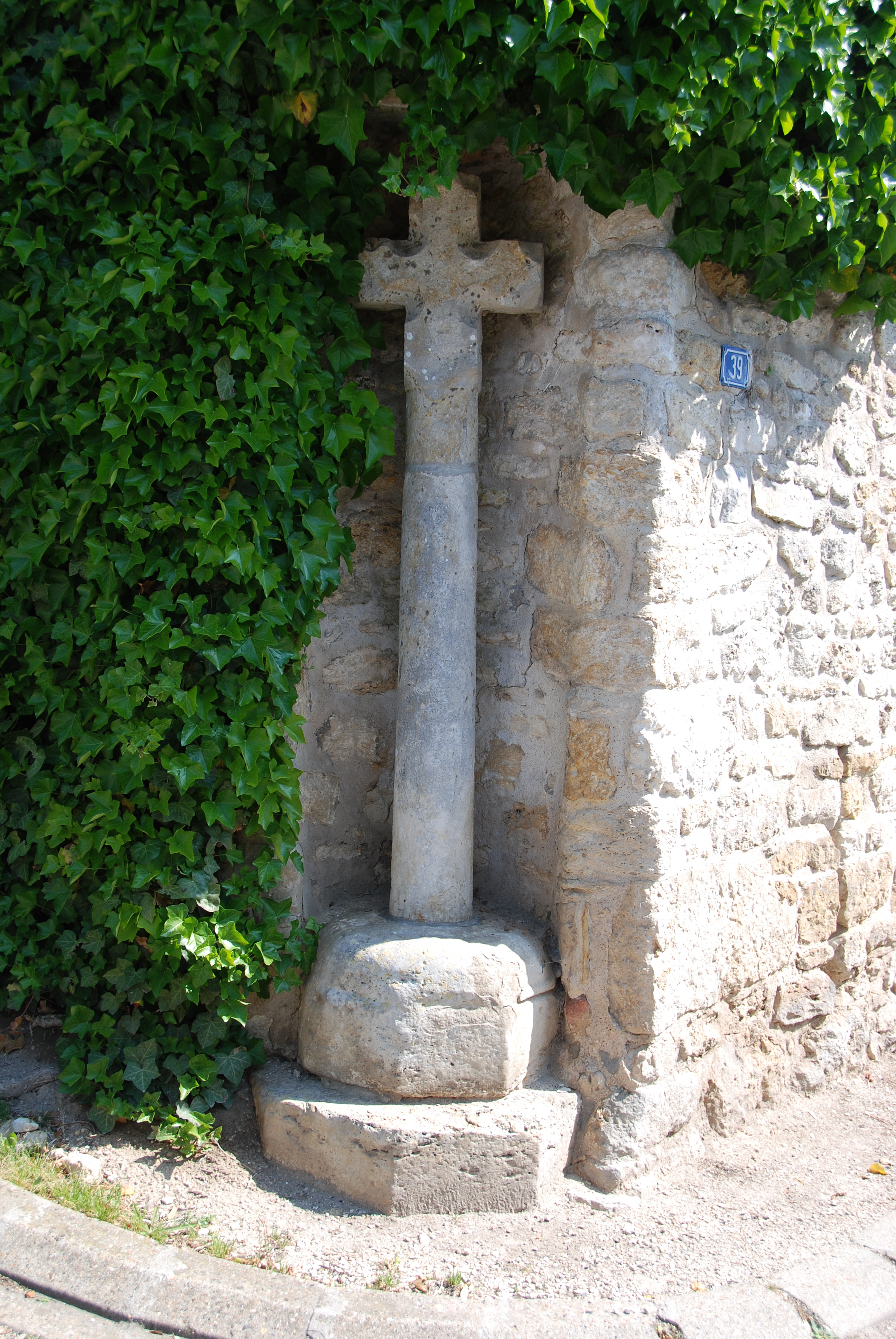 Ancienne croix du cimetière